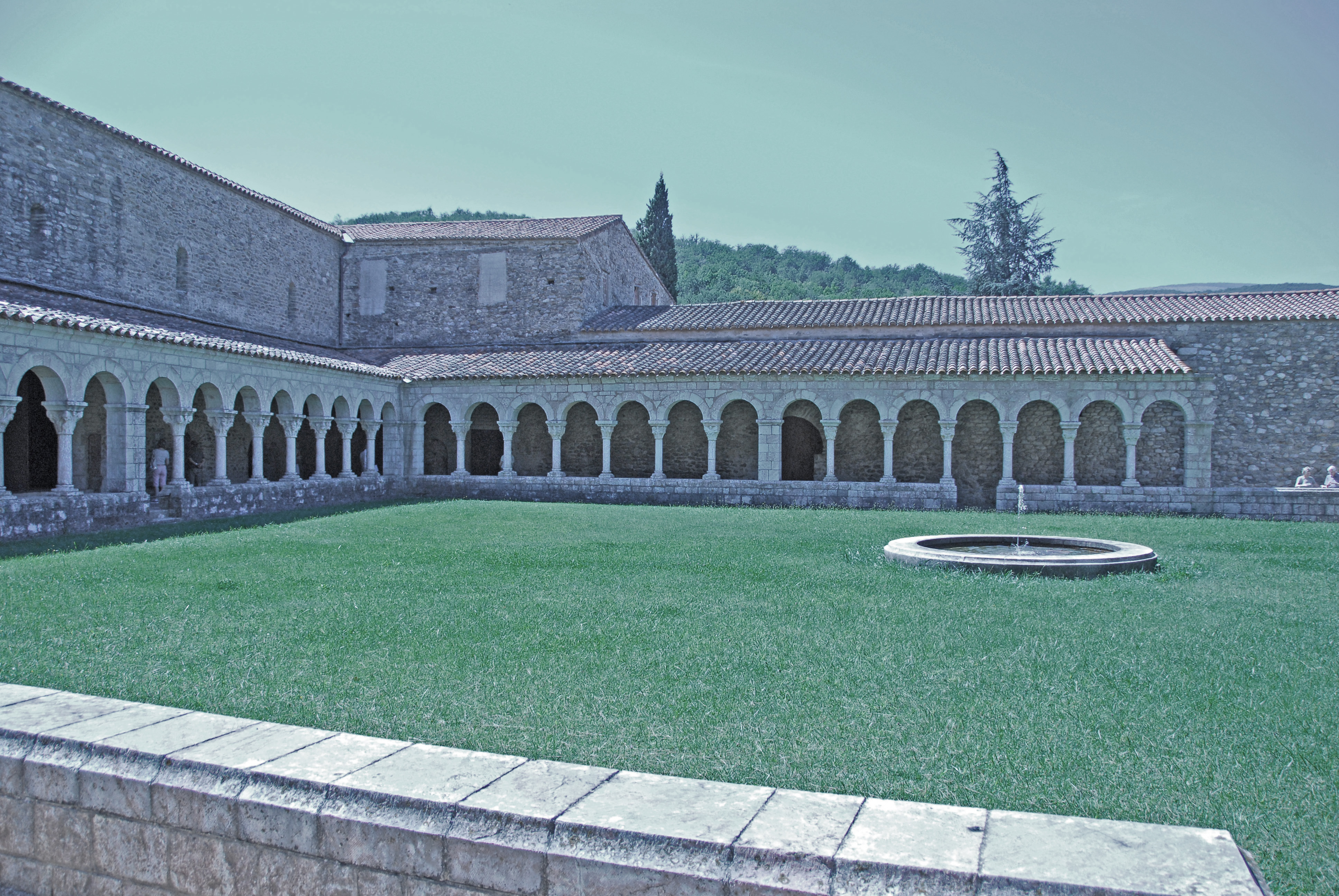 Abbaye Michel-de-Cuxa, Kreuzgang, Osteck